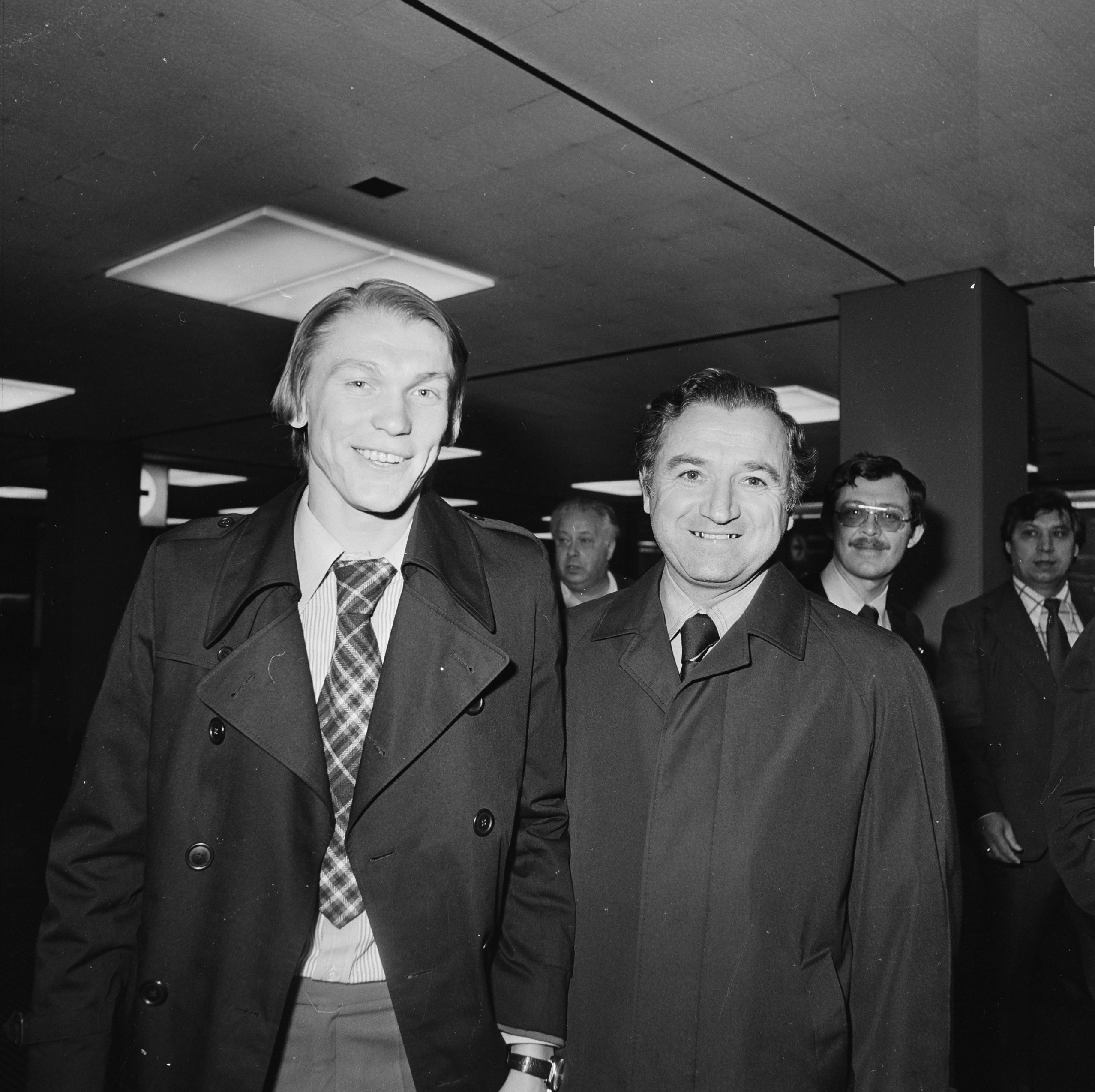 Collectie / Archief : Fotocollectie Anefo Reportage / Serie : [ onbekend ] Beschrijving : Aankomst Schiphol Russisch elftal; sterspeler Blochin (l) met trainer Simoniayev Datum : 3 oktober 1977 Locatie : Noord-Holland, Schiphol Trefwoorden : sport, voetbal Fotograaf : Croes, Rob C. / Anefo Auteursrechthebbende : Nationaal Archief Materiaalsoort : Negatief (zwart/wit) Nummer archiefinventaris : bekijk toegang 2.24.01.03 Bestanddeelnummer : 929-3735